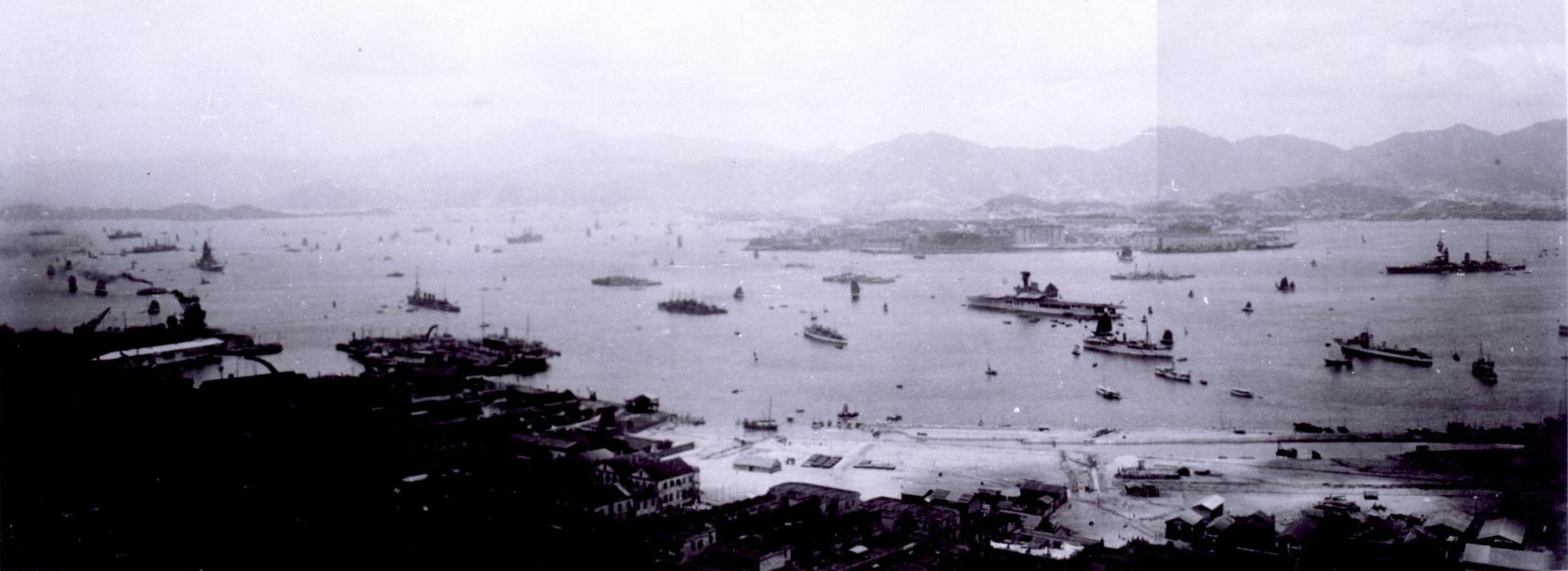 香港ビクトリア・ハーバーでの日本艦隊 於香港維多利亞港的日本艦隊 IJN Fleet in Hong Kong Victoria Harbour